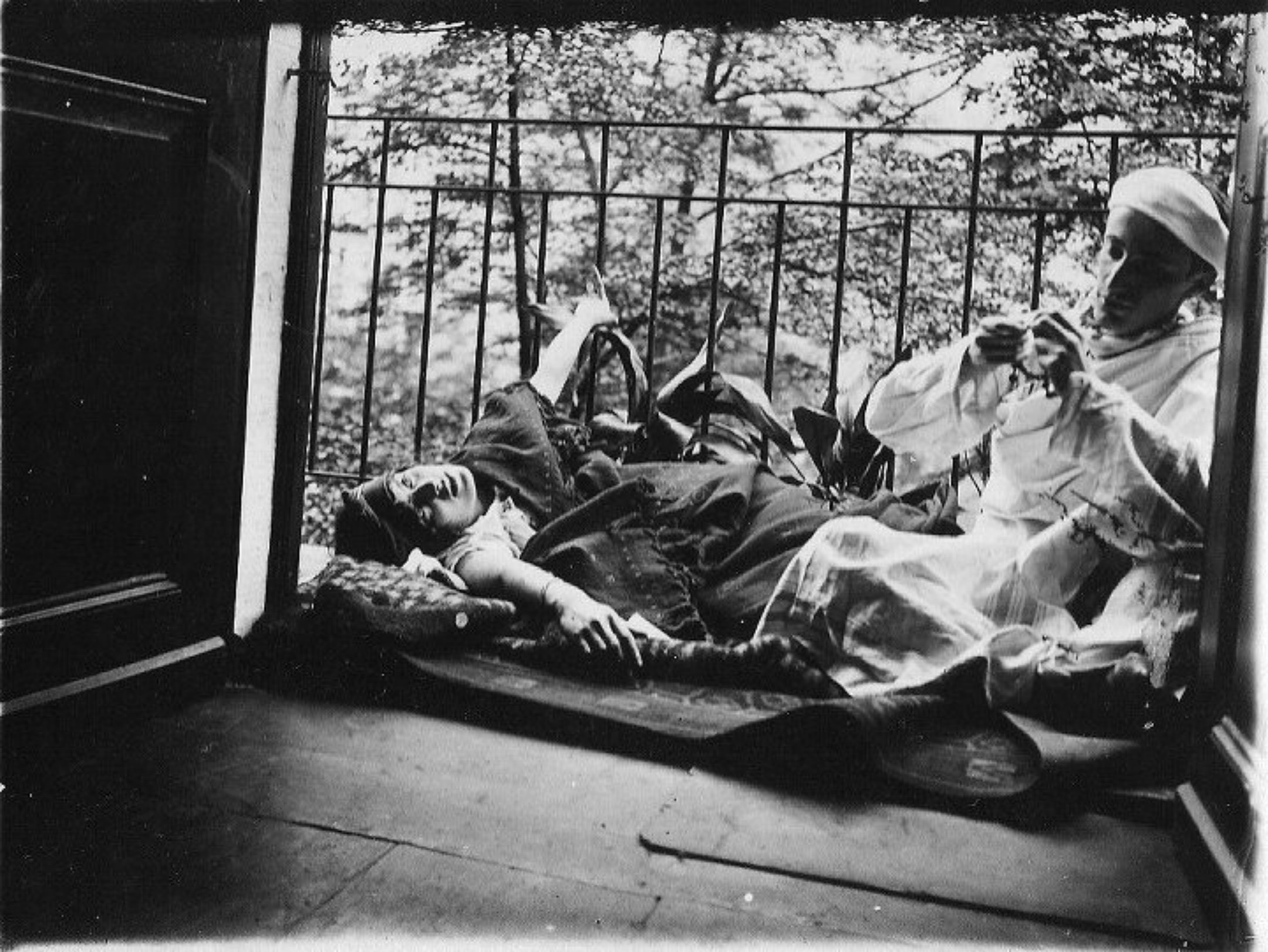 Валентин Парнох и Елизавета Парнох на балконе родительского дома в Таганроге, 1910 год